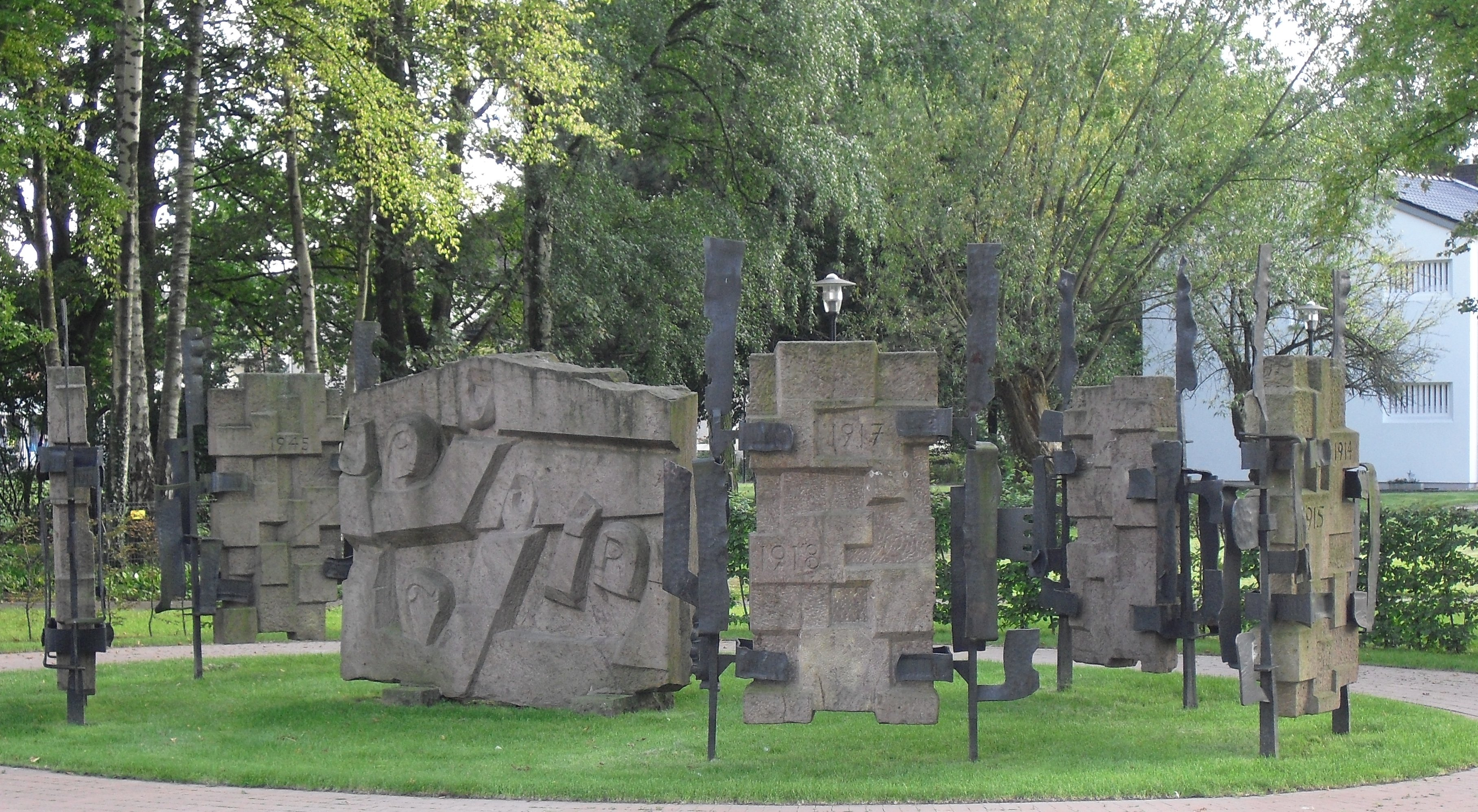 Mahnmal an der Schloßstraße in Hövelhof, ein Werk von Josef Rikus. Einweihung war am 17. Juni 1966